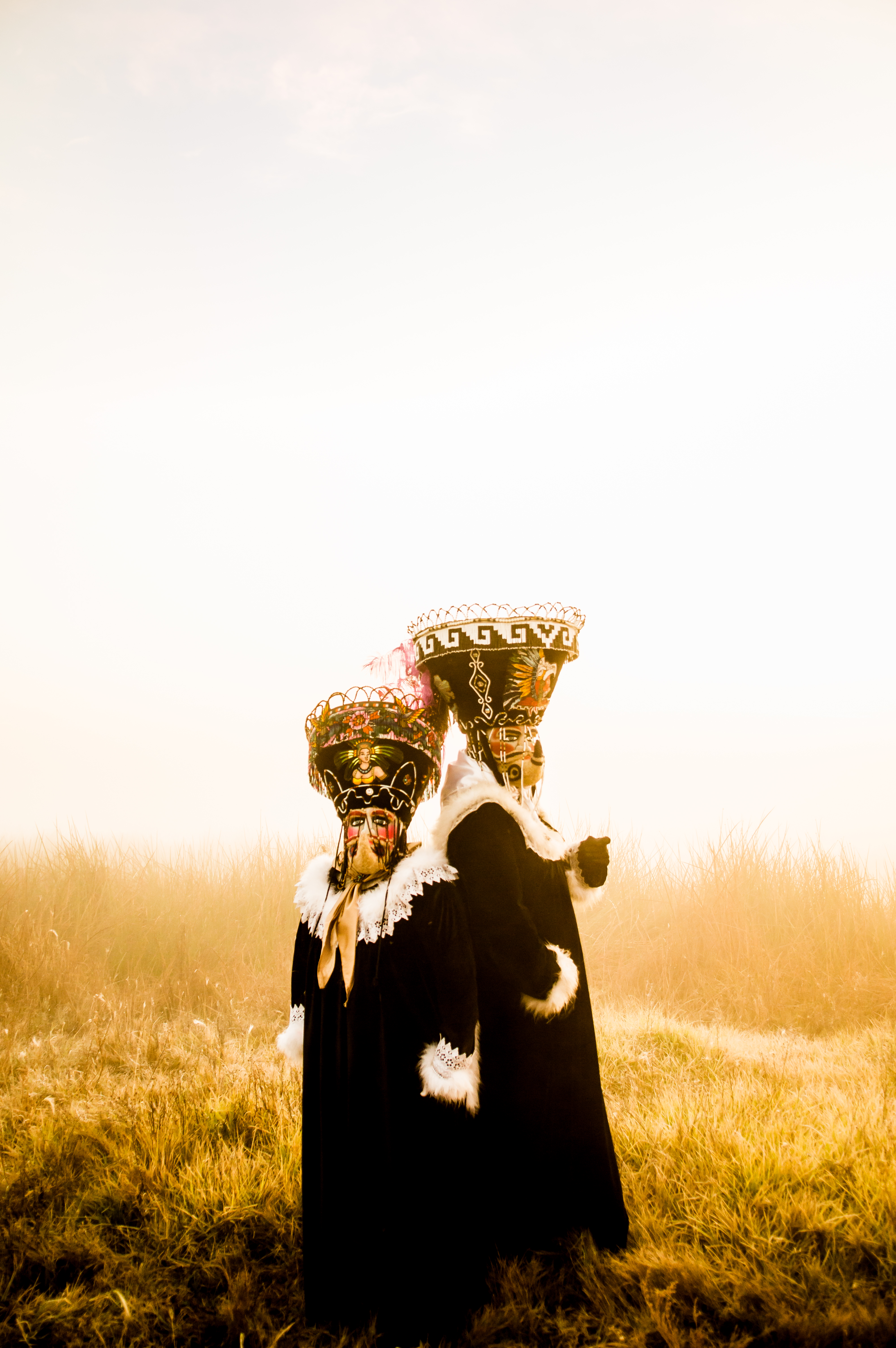 Fue tomada en el Xochimilco, Ciudad de México.